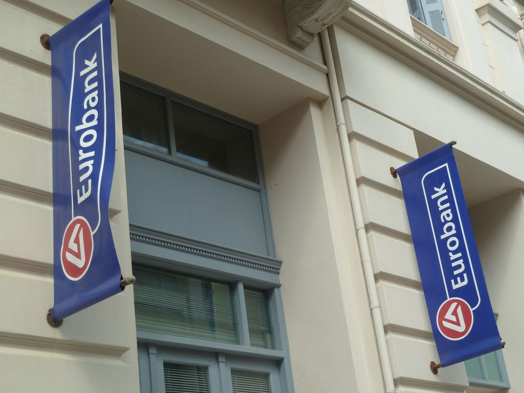 Zur Euro-Griechenland-Krise hier das obligatorische Bild dieser Bank mit dem wunderbaren Namen. by